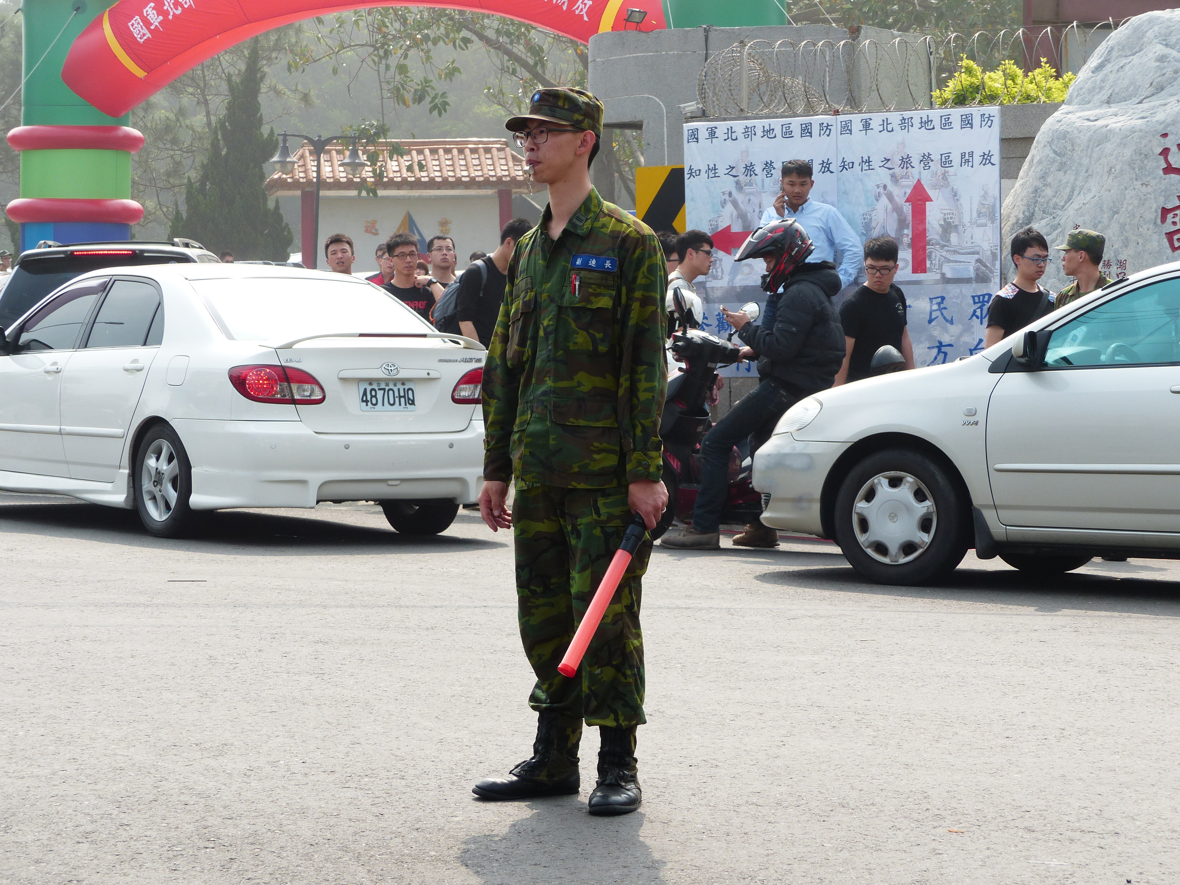 陸軍湖口營區二號門外，漢陽路與勝利路口指揮交通的副連長黃中尉。